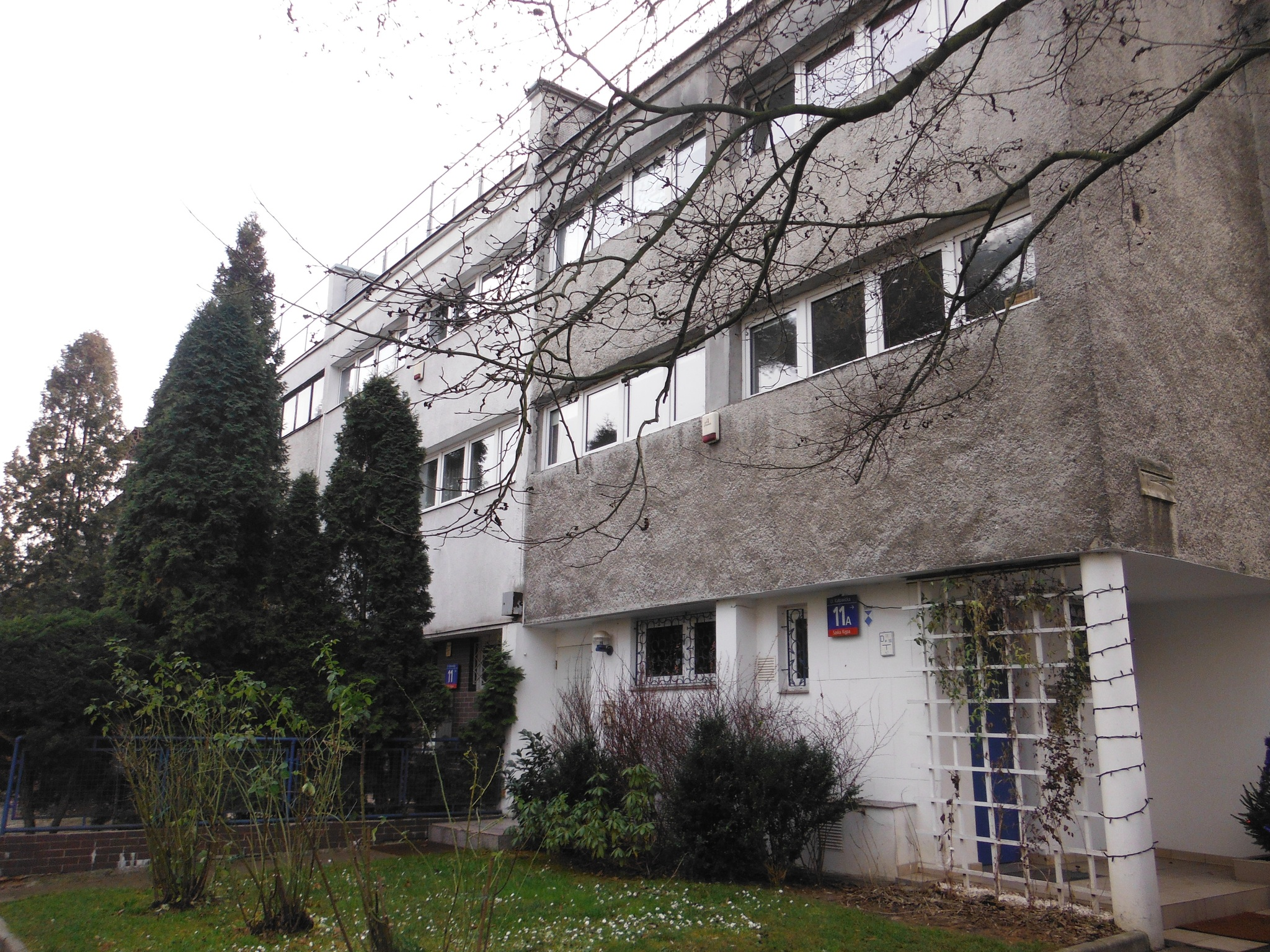 Dom trójrodzinny Lachertów przy ul. Katowickiej 9, 11 i 11A w Warszawie. Zaprojektowany przez Bohdana Lacherta i Józefa Szanajcę, 1928-1929.